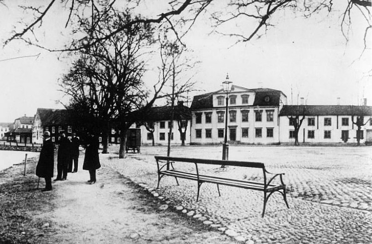 Fiskartorget på 1870-talet. Gaggeska gården syns längst till höger, där Stadshuset står i dag.